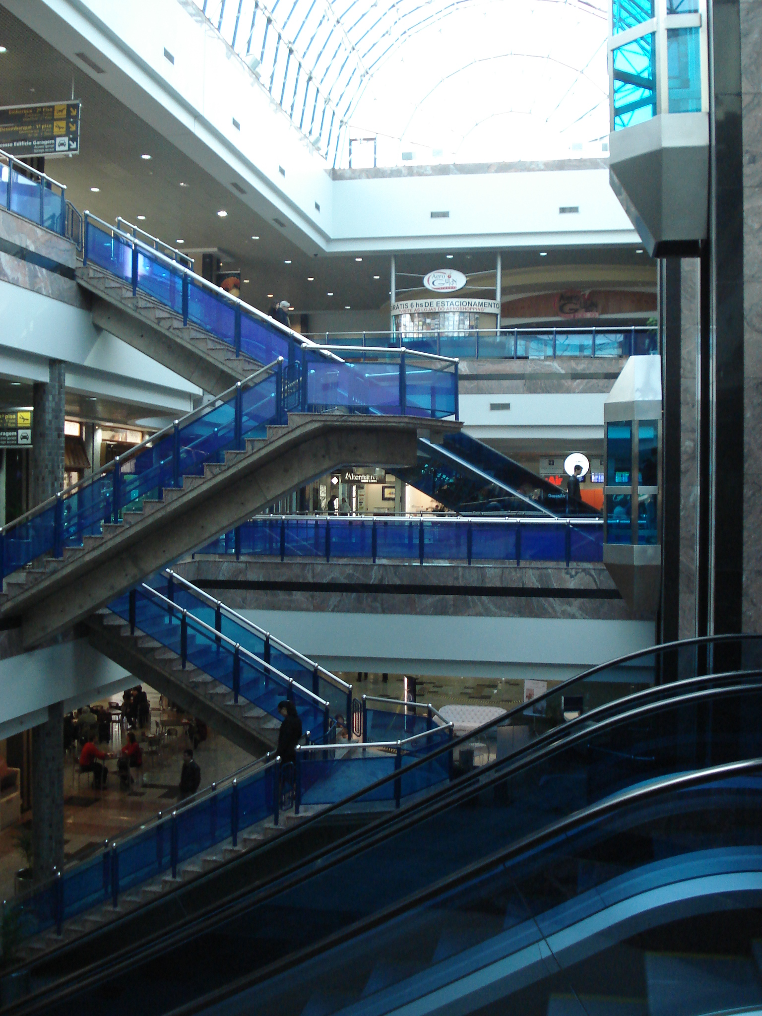 Aeroporto Internacional Salgado Filho, Porto Alegre, RS, Brasil